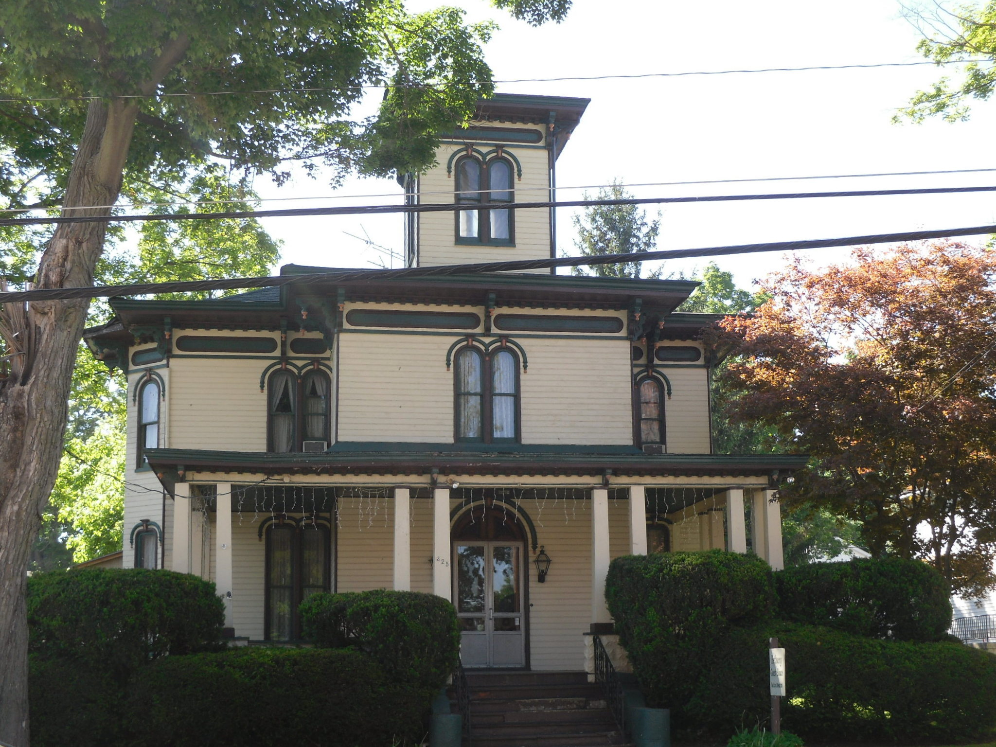 Cambridge Springs, Pennsylvania